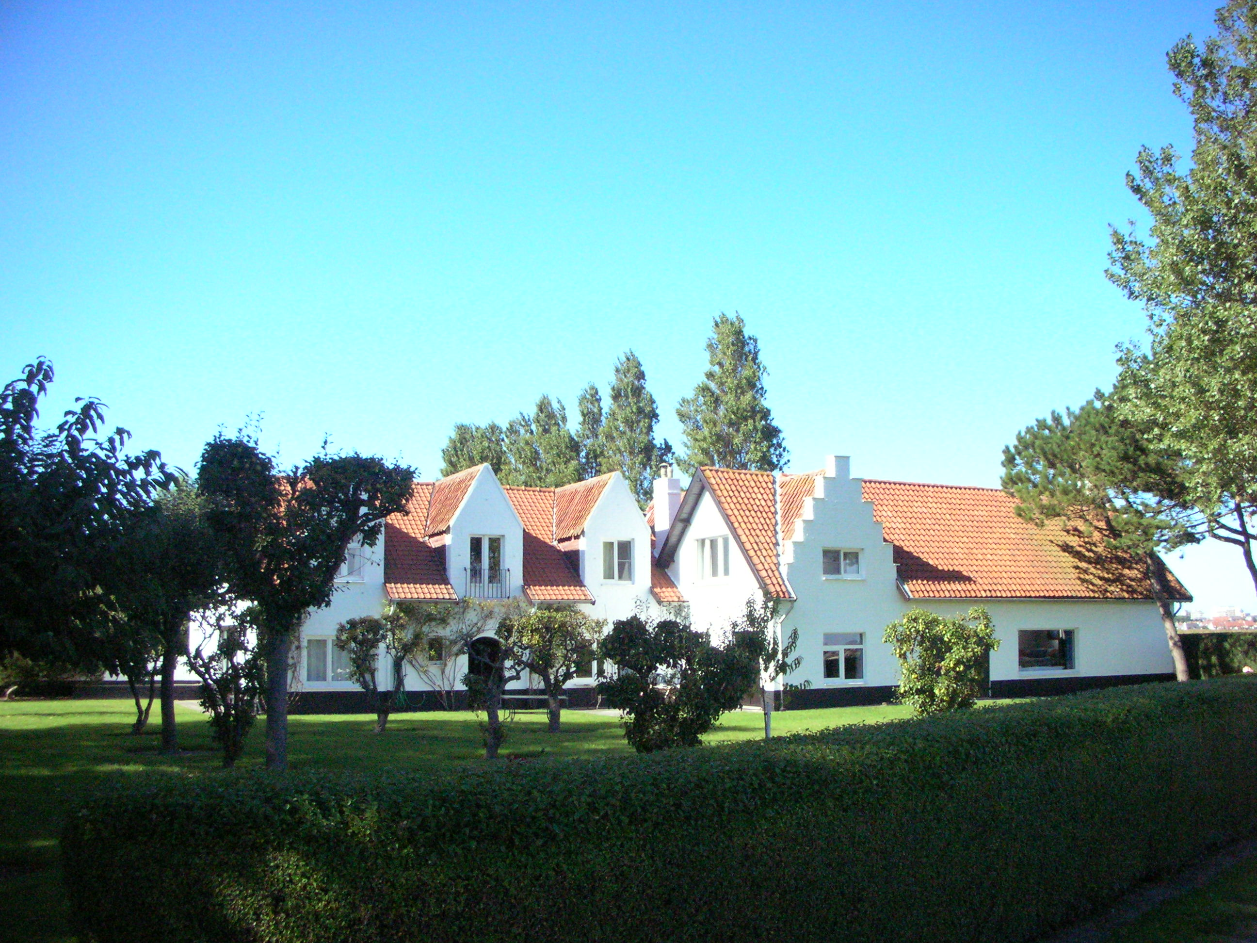 Propriété d'Antoine Allard, Heyst-sur-Mer